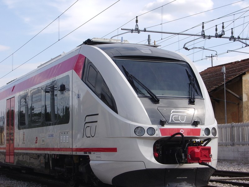 Esterno della cabina di testa del Pinturicchio, versione del Minuetto per la Ferrovia Centrale Umbra (FCU).